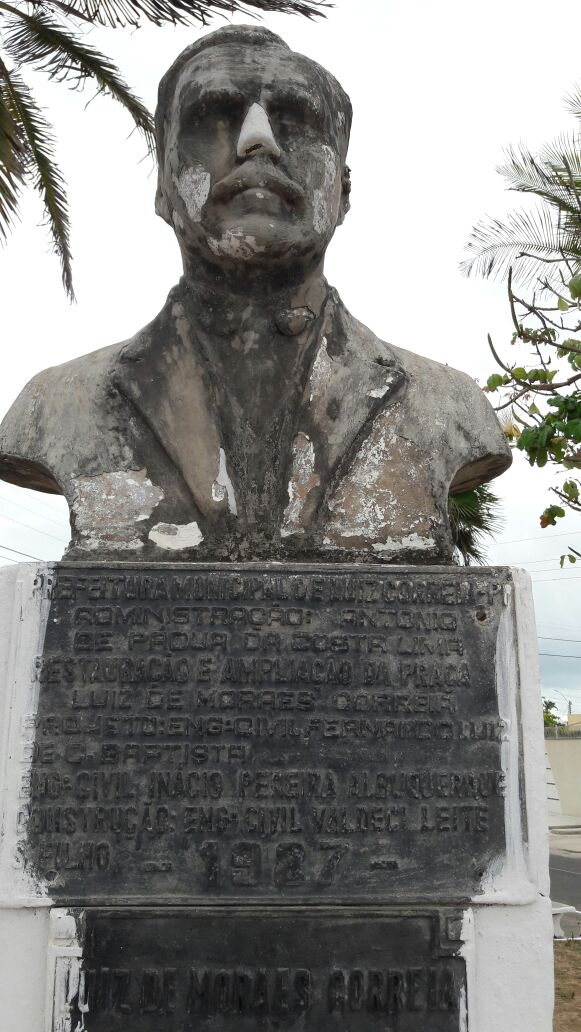 Busto de Luís de Moraes Correia na praça da rodoviária em Luís Correia (Piauí).